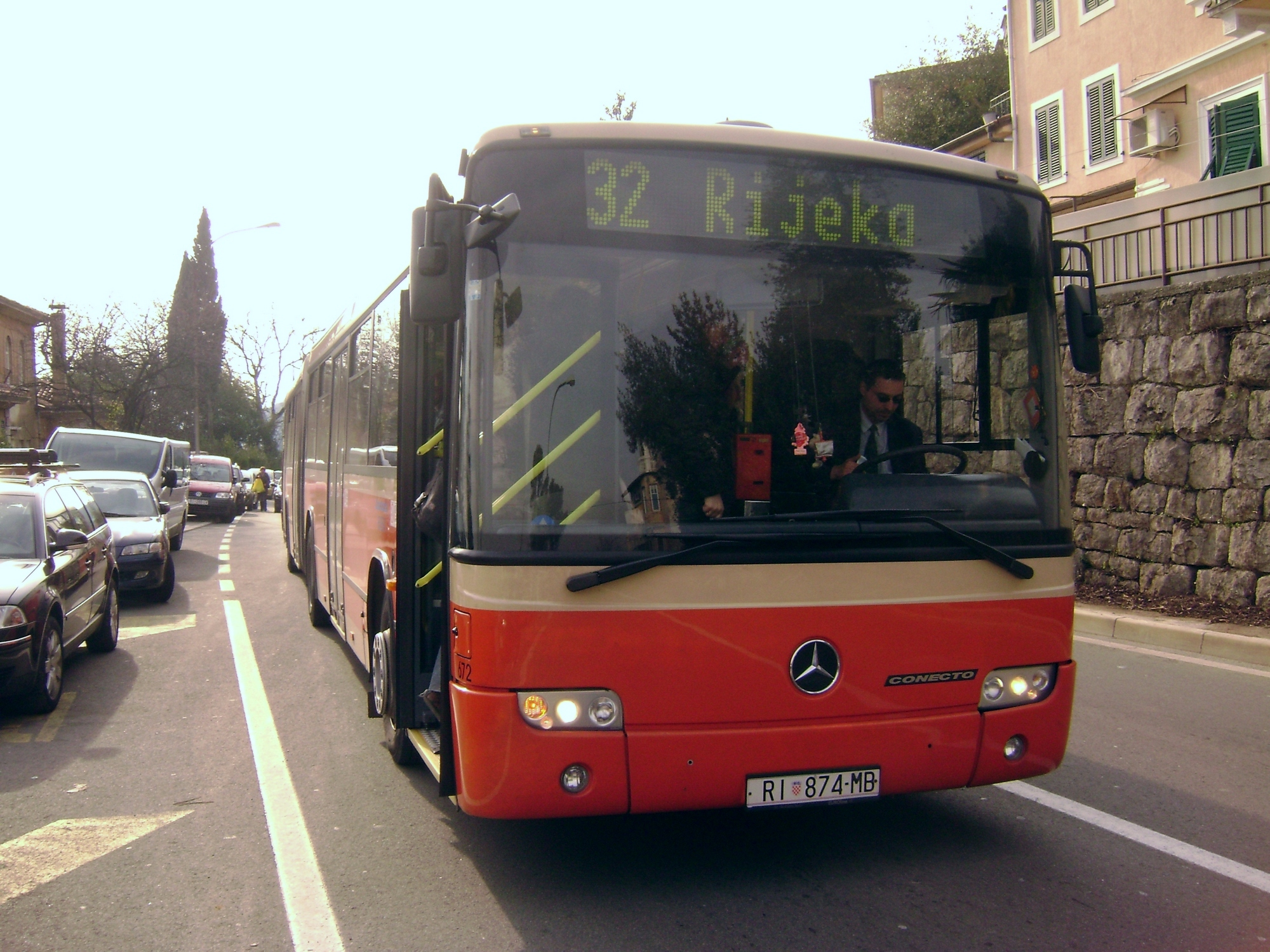 An Autotrolej bus in Rijeka.